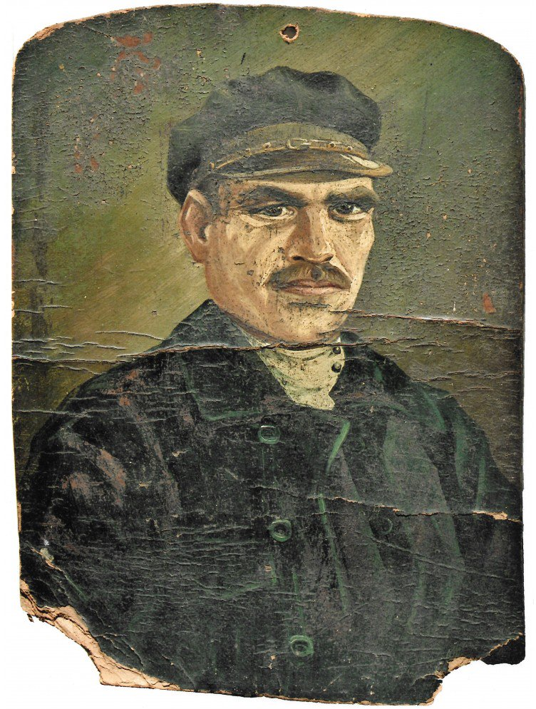 Предполагается, что Казимир Малевич написал портрет Юровского во время пребывания в Курске (с 1896 по 1907 год) до переезда в Москву и Ленинград